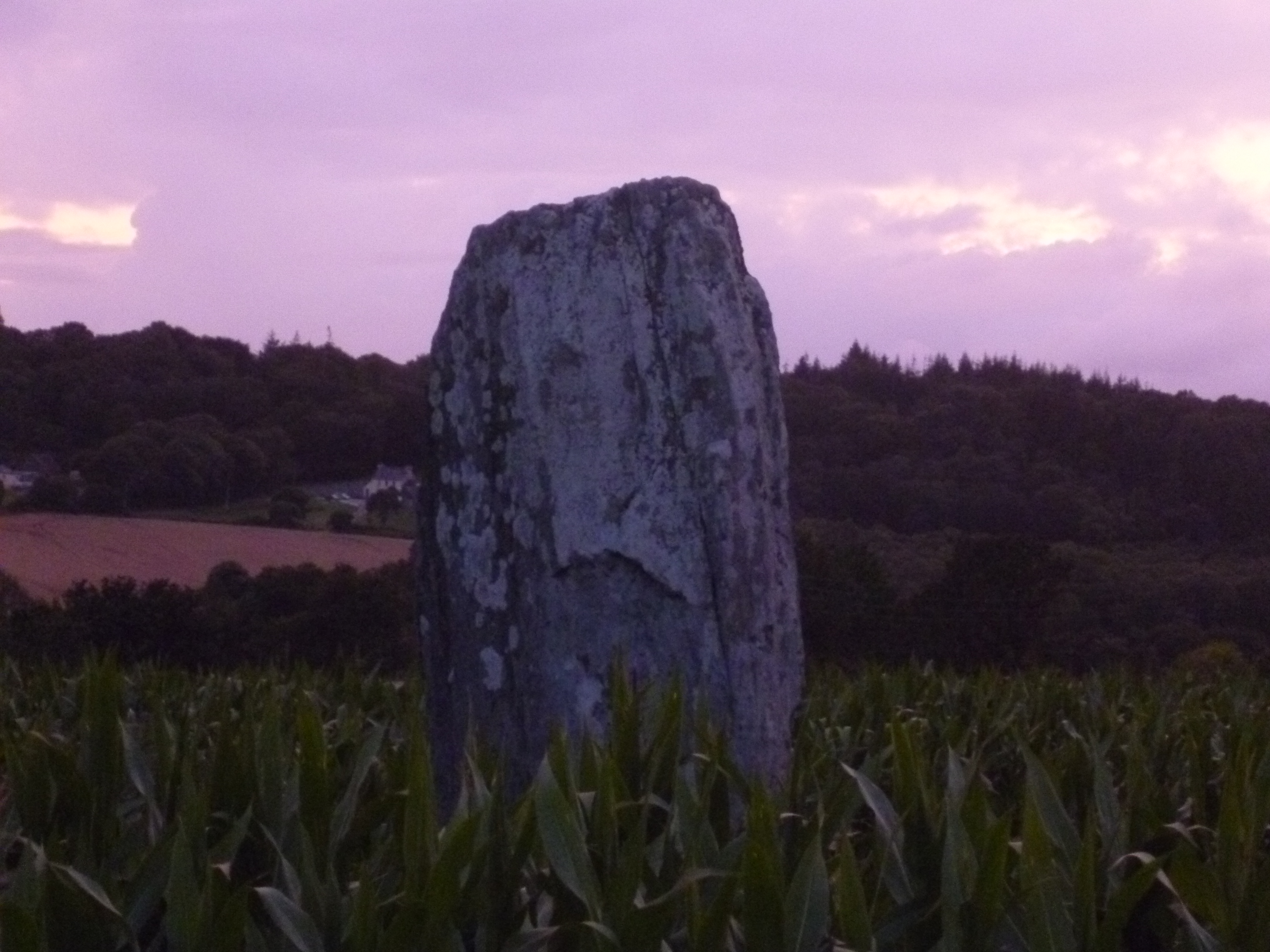 Menhir le long de la route